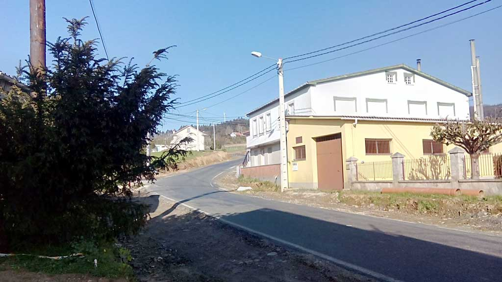 Vista do Pazo, Sedes.